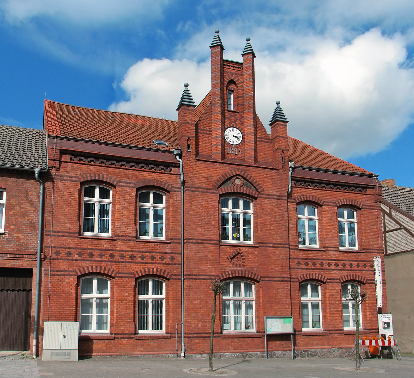 Beschreibung: town hall of Richtenberg Fotograf: Darkone, 14. April 2006